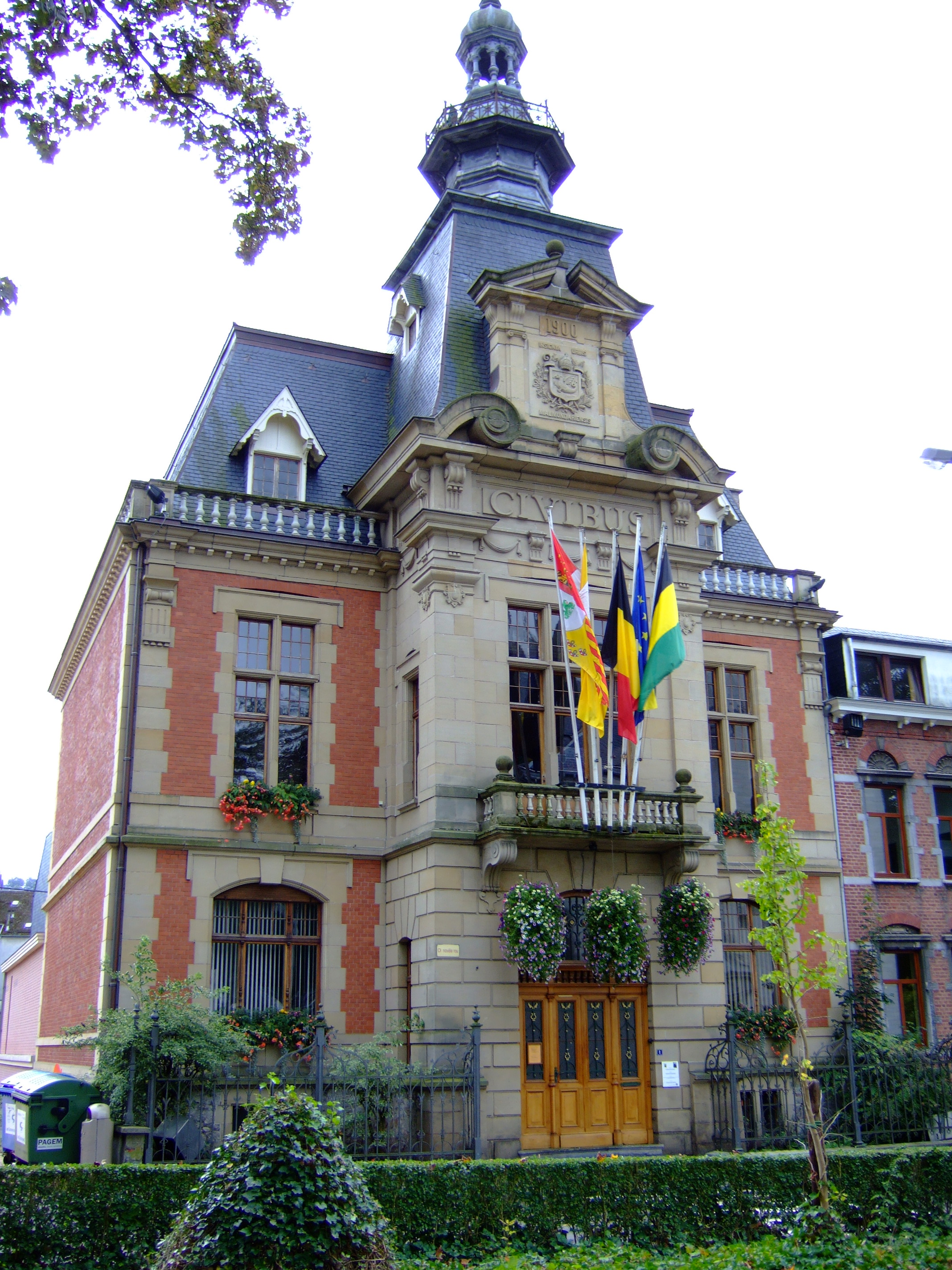 Rathaus in Malmedy - Belgien